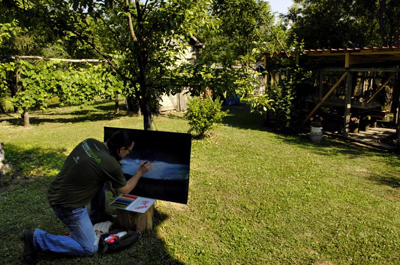 Бранислав Лукић Лука (Тузла 31. март 1970.) Мултимедијални уметник, Босна и Херцеговина.На фотографији је забележен рад на слици "Rift" (процеп).